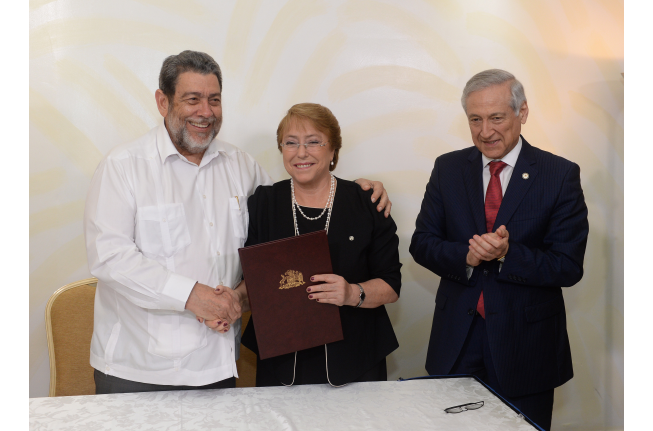 Firma de un acuerdo de servicios aéreos entre Chile y San Vicente y las Granadinas. En la foto,el Primer Ministro de San Vicente y las Granadinas, Ralph Gonsalves junto a la presidenta de Chile, Michelle Bachelet, y el canciller chileno Heraldo Muñoz.